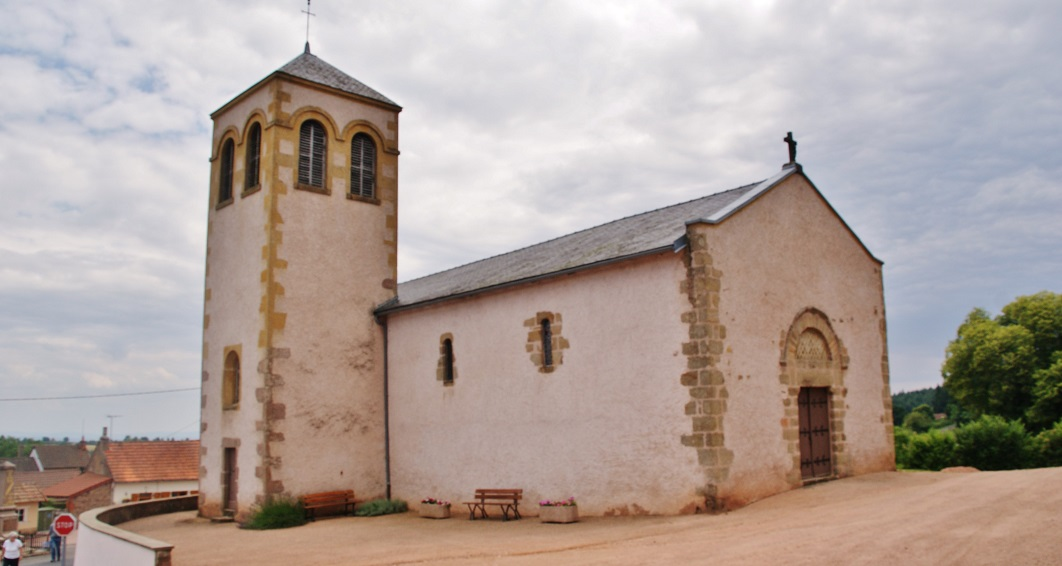 église St Pierre